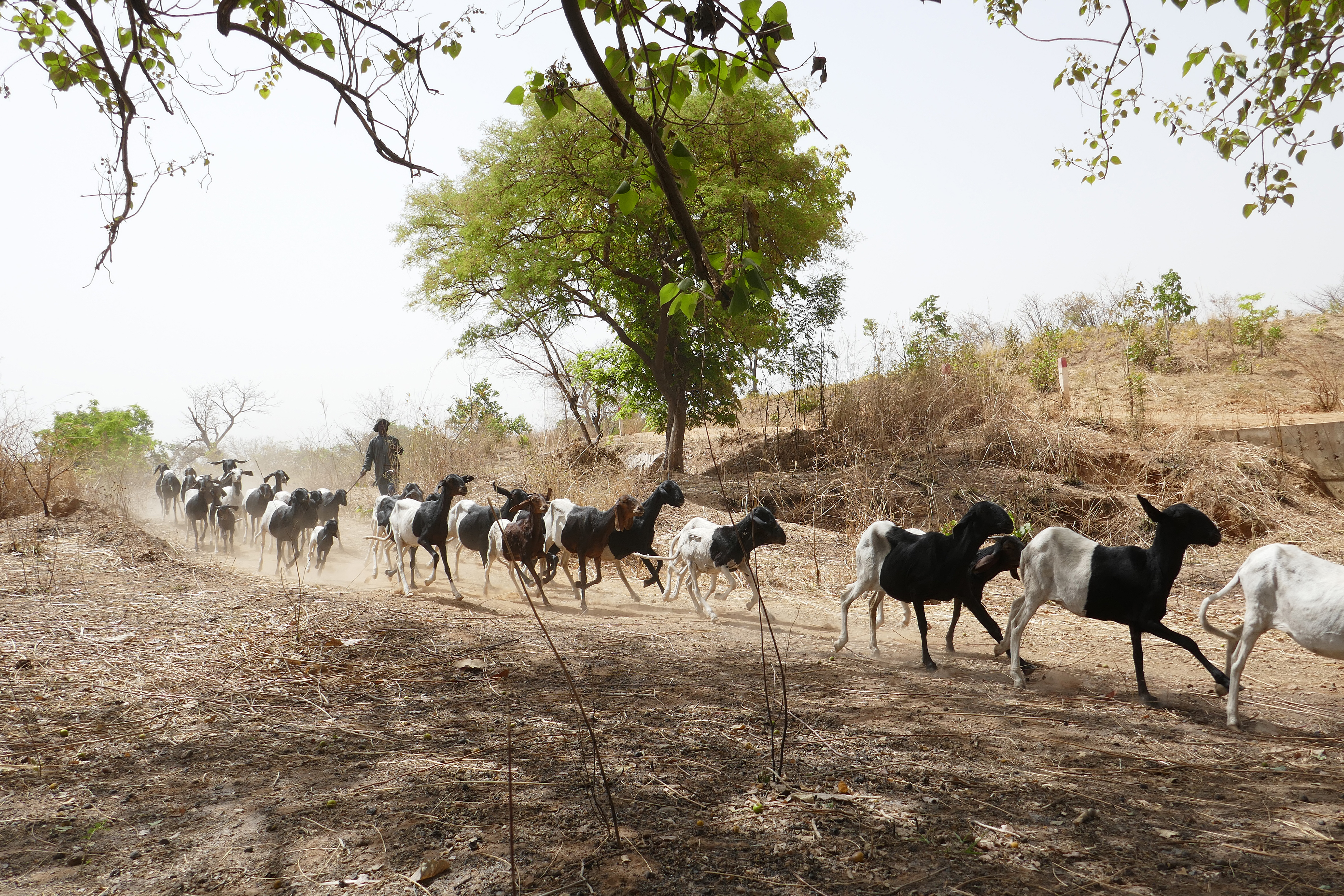 Troupeau de moutons bicolores à proximité de la rivière Koumagou, entre Boukoumbe et Tanguieta (Bénin).